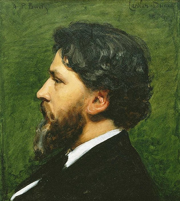 Duran: Portrait des Philippe Burty, 1874, Ohio (GNU-FDL, der Künstler ist über 70 Jahre tot.)